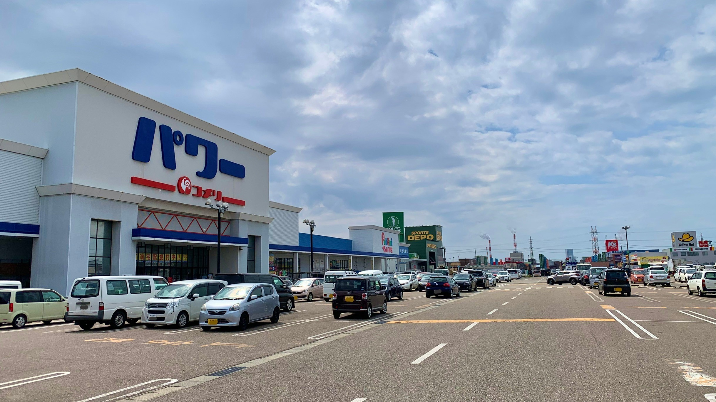 コメリパワー河渡店（新潟市東区，2020年4月）